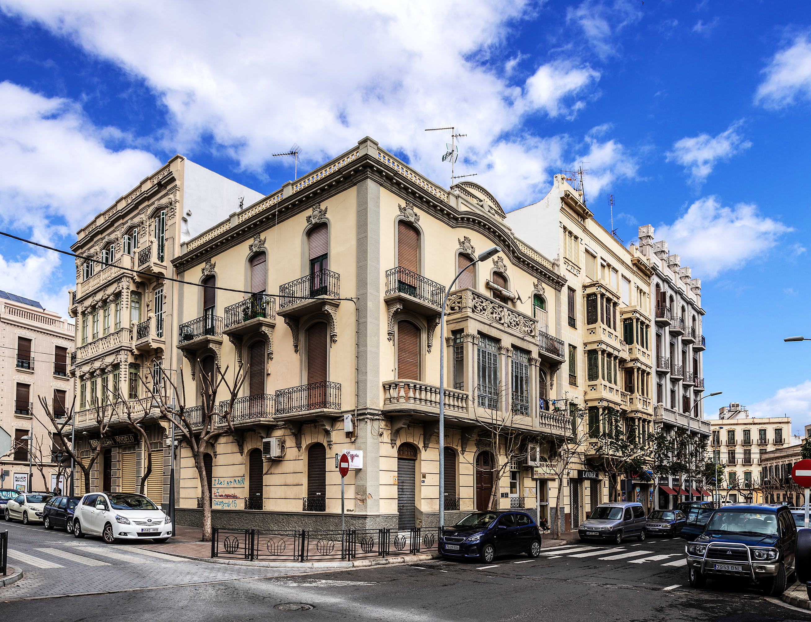 La Casa Miguel Gómez Morales es un edificio de estilo modernista que está ubicado en la esquina que forman la calle Gabriel de Morales y la calle Cardenal Cisneros del Ensanche Modernista, Melilla (España), y forma parte del Conjunto Histórico Artístico de la Ciudad de Melilla, un Bien de Interés Cultural.